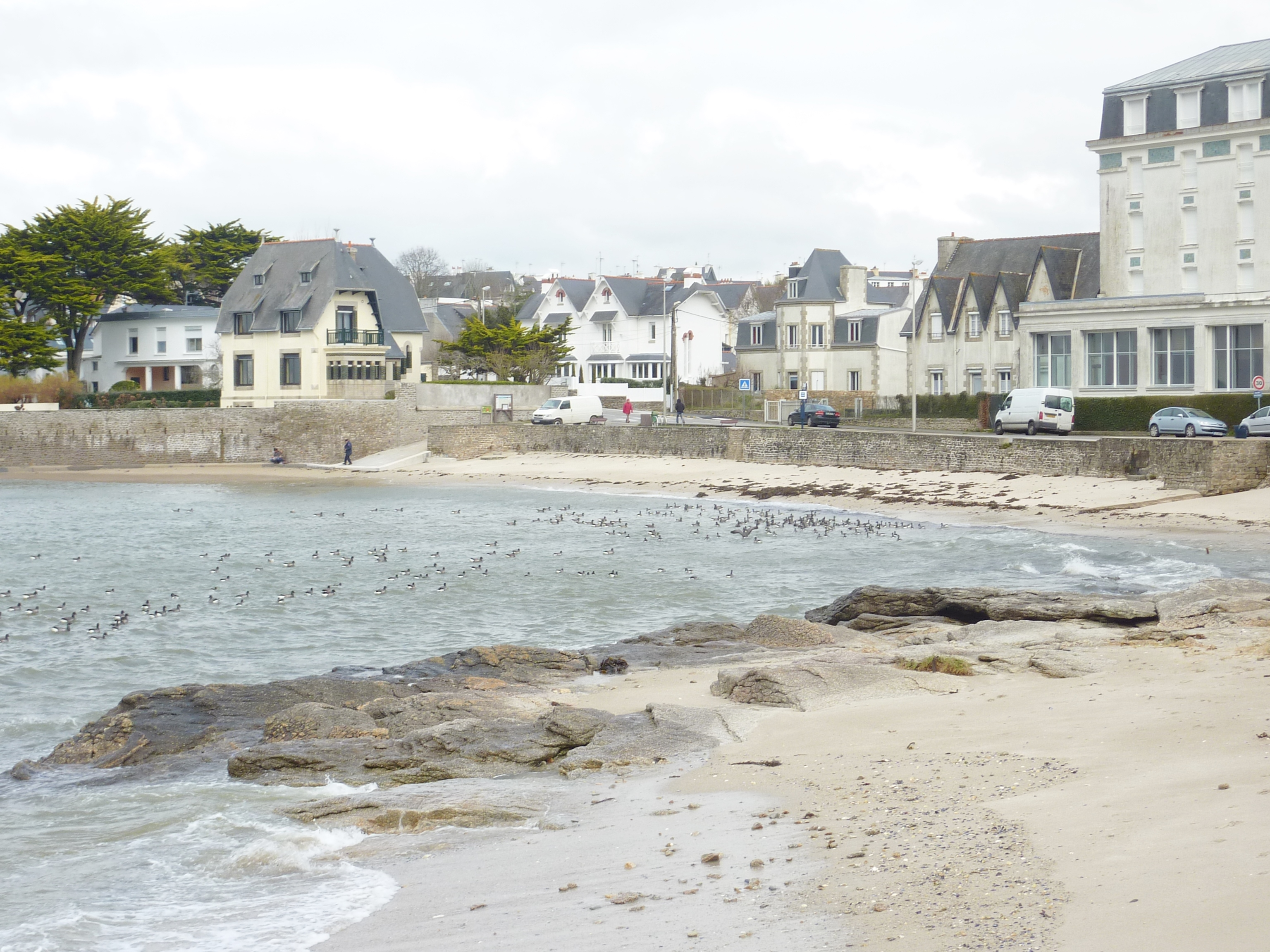 La plage de Cornouaille à Concarneau